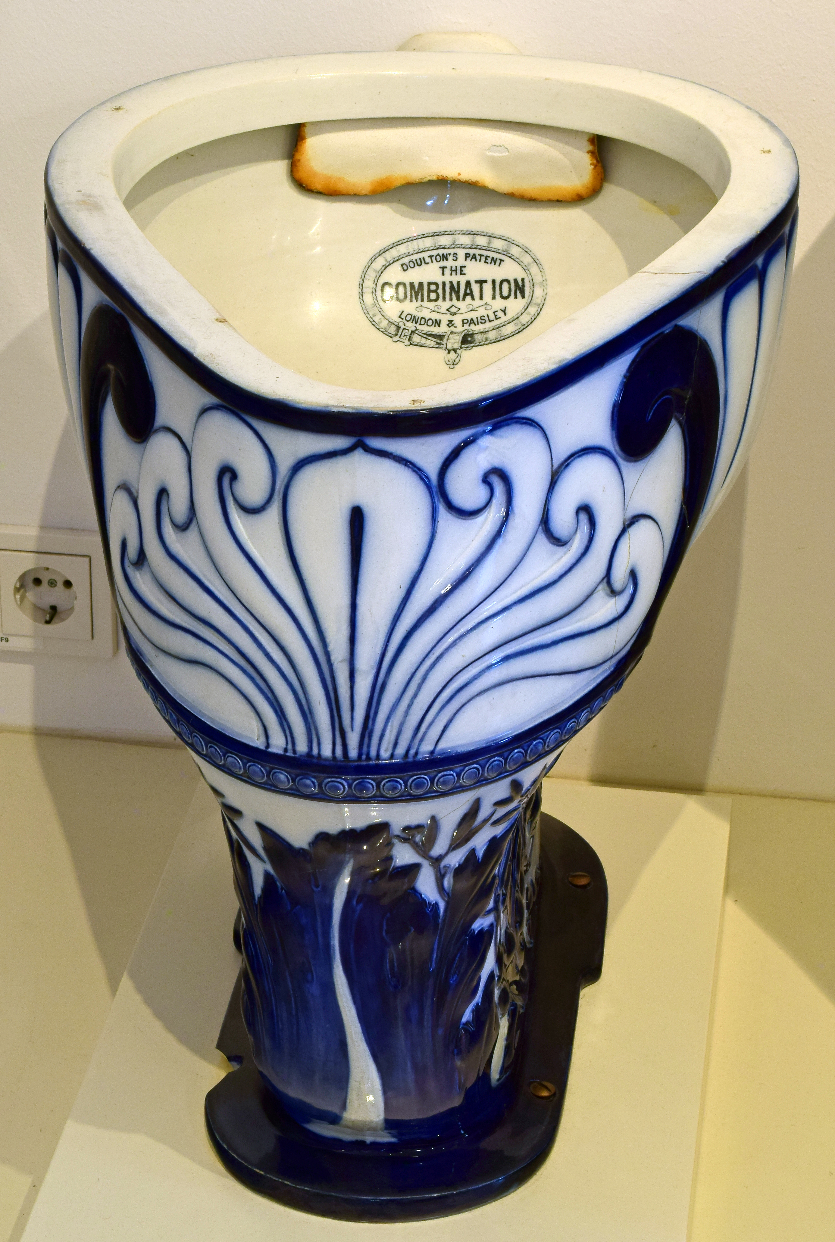 Ausstellungsstück im Museum für historische Sanitärobjekte im Kammerhof, Gmunden